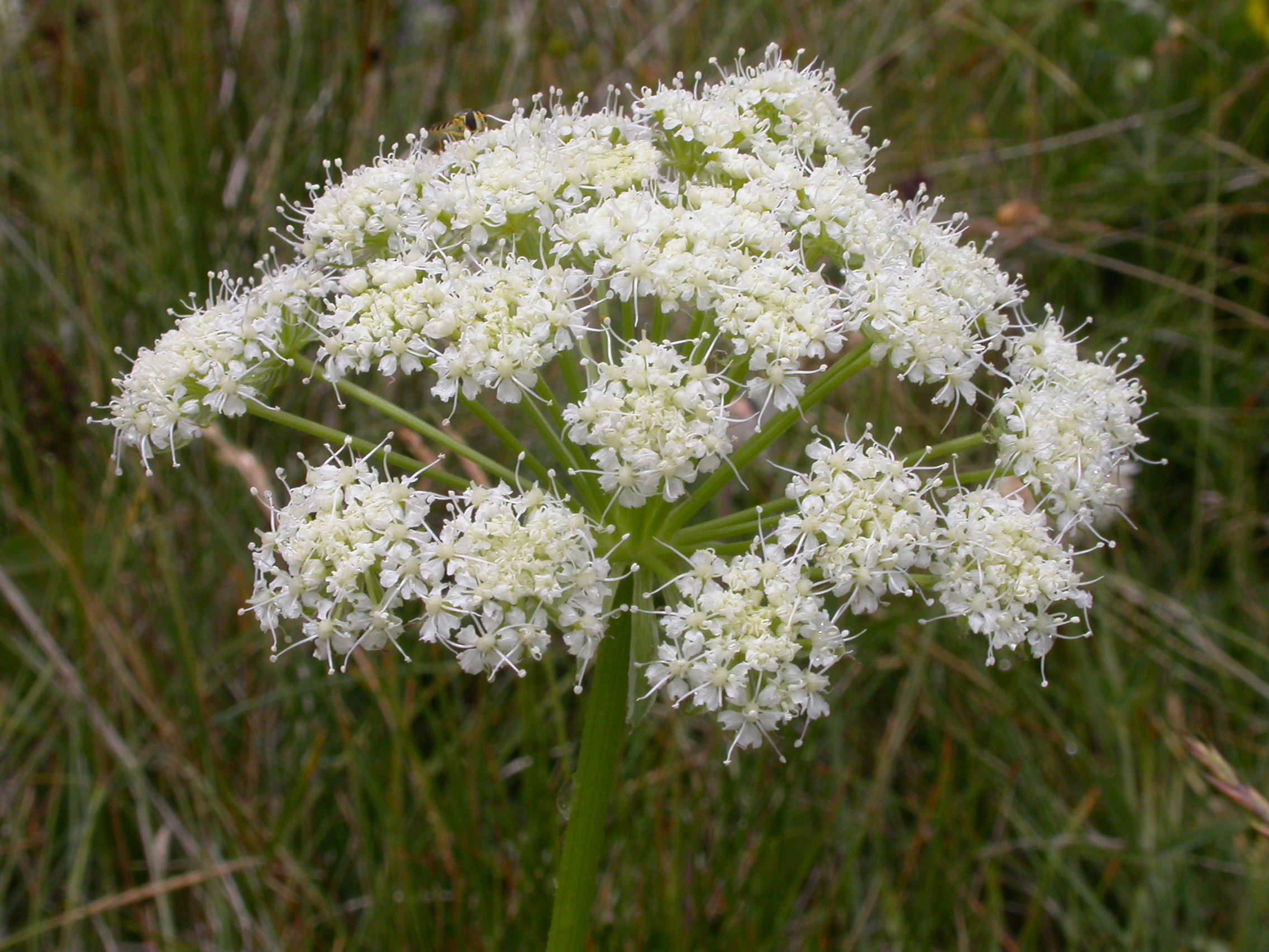 Laserpitium halleri Zermatt, Riffelberg (Kanton Wallis, Switzerland), 2500 m Author: Barbara Studer – own photograph Date: 2.08.06